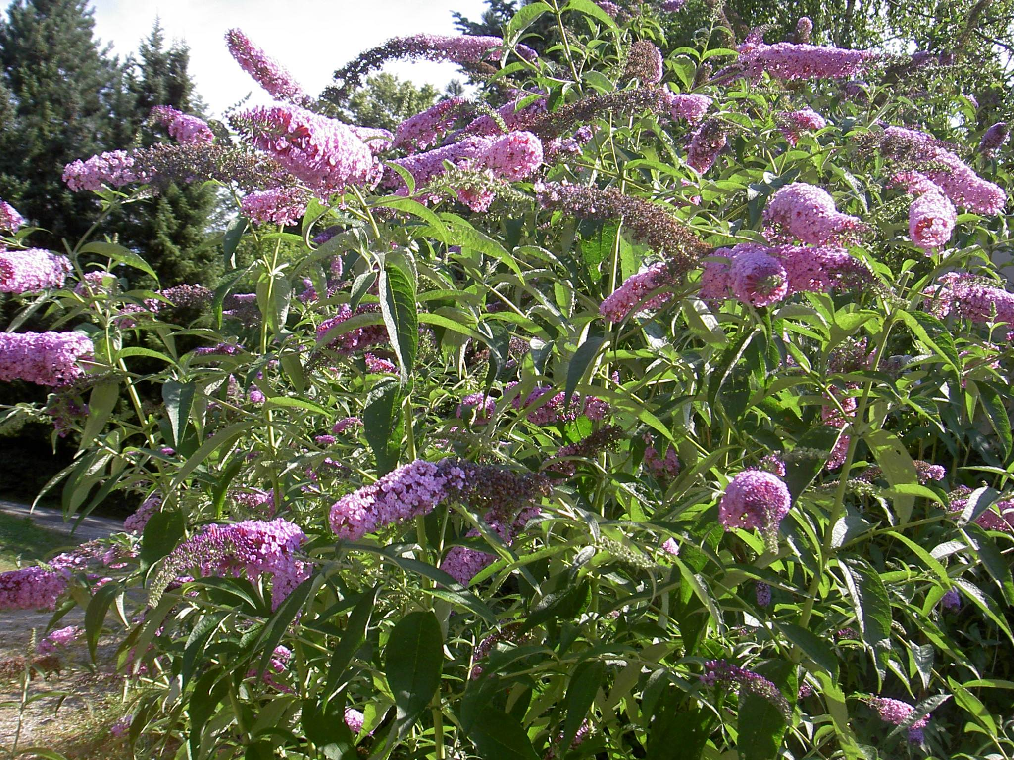 Buddleja davidii de: Sommerflieder-Strauch, Steiermark.